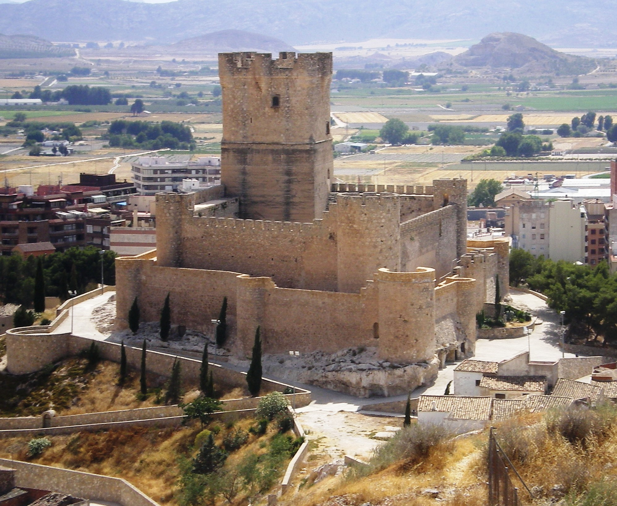 Vista del Castillo de la Atalaya (Villena) desde el inicio del sendero que se dirige a la mina de los colores y salvatierra a los pies de la Sierra de la Villa.